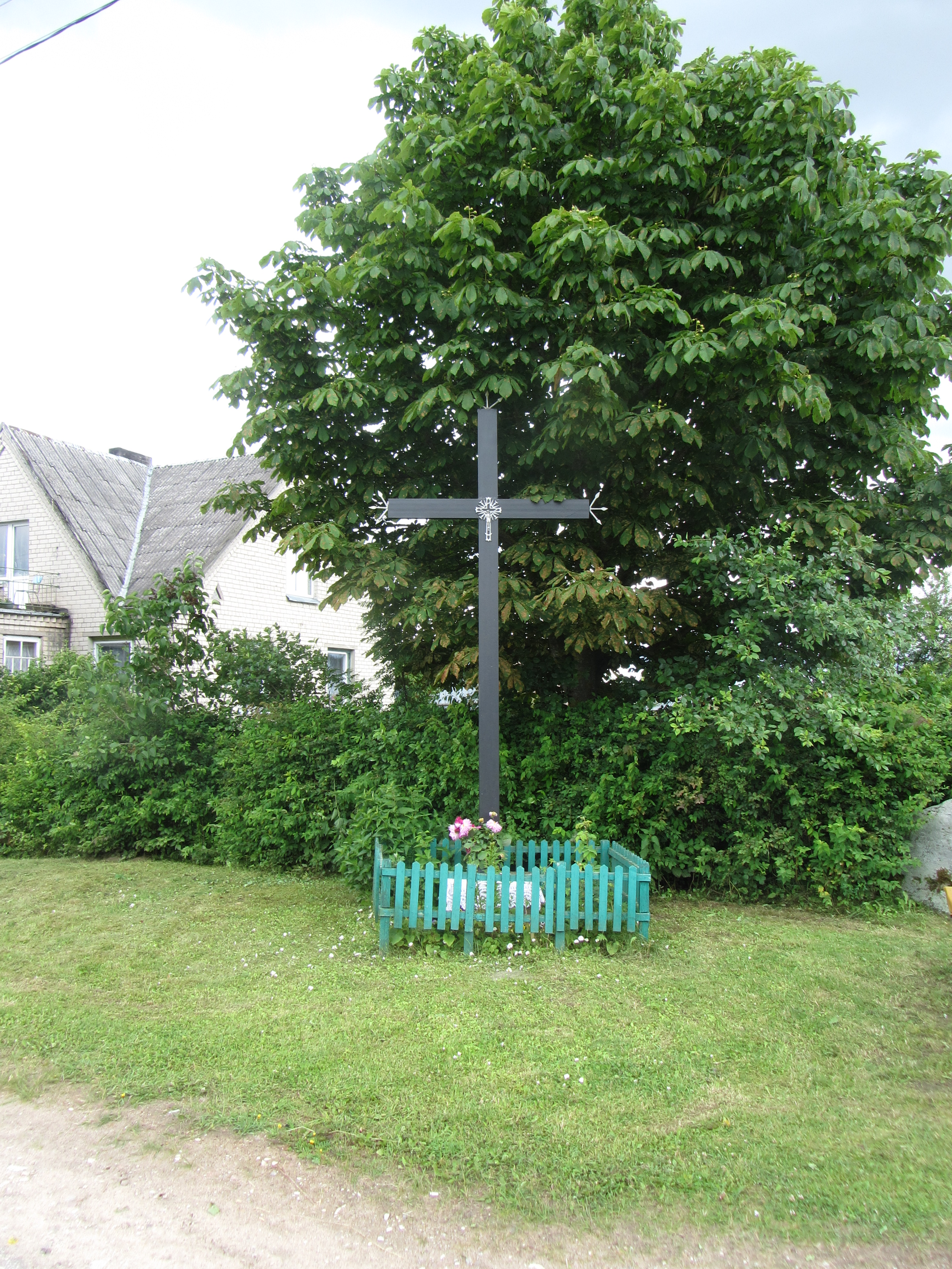 Rastinėnai, Lithuania